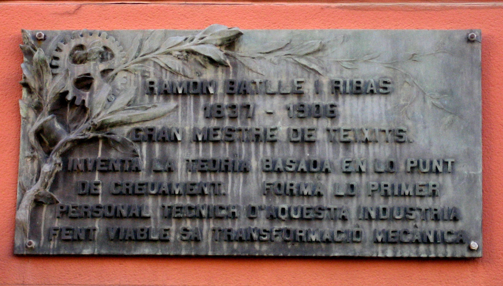 Placa dedicada a Ramon Batlle i Ribas a Sant Andreu de Palomar (Barcelona) Catalunya